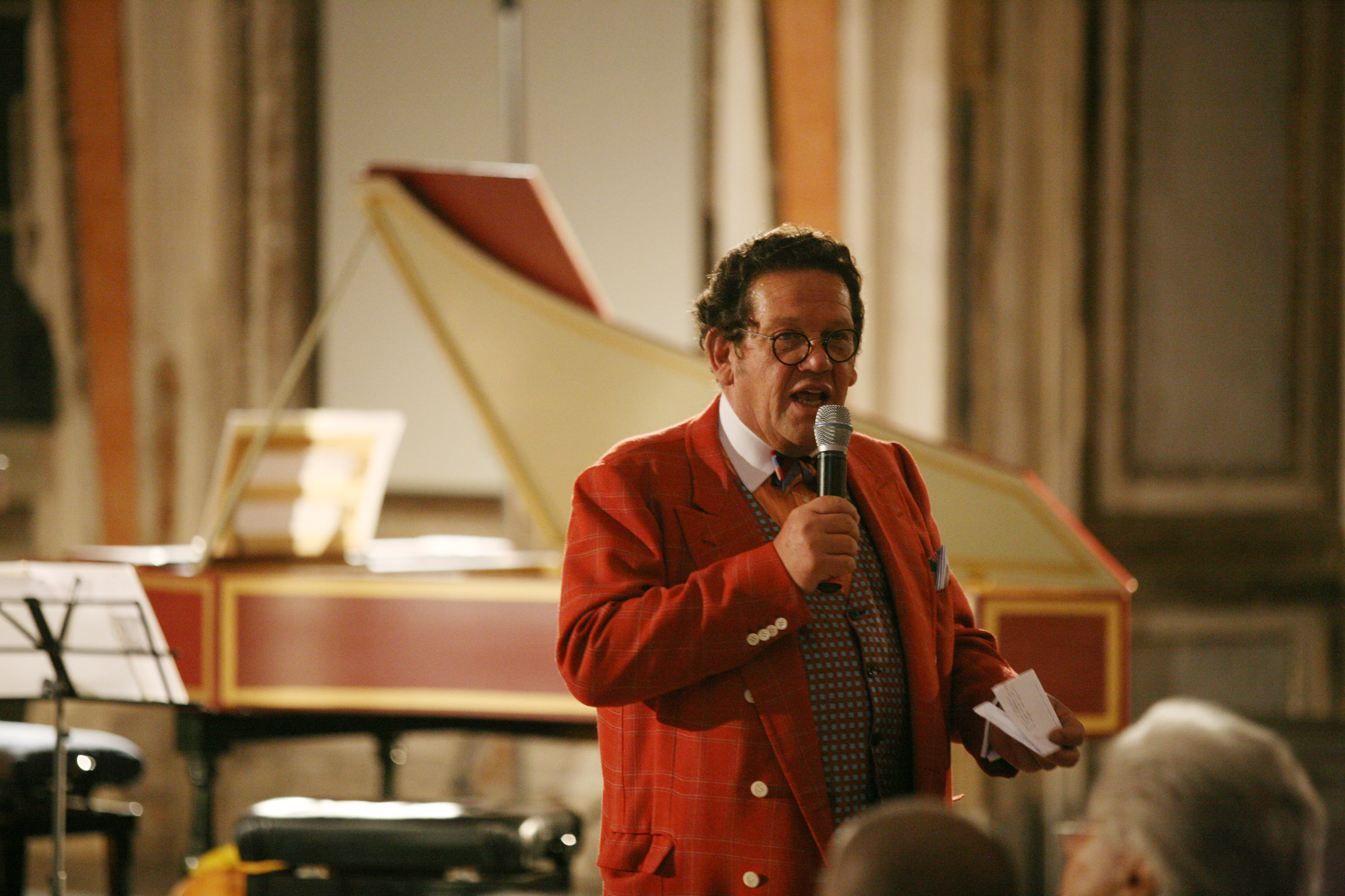 Philippe Daverio alla presentazione di un evento musicale della rassegna MITO SettembreMusica. Milano, Palazzo Reale, sala delle Cariatidi.